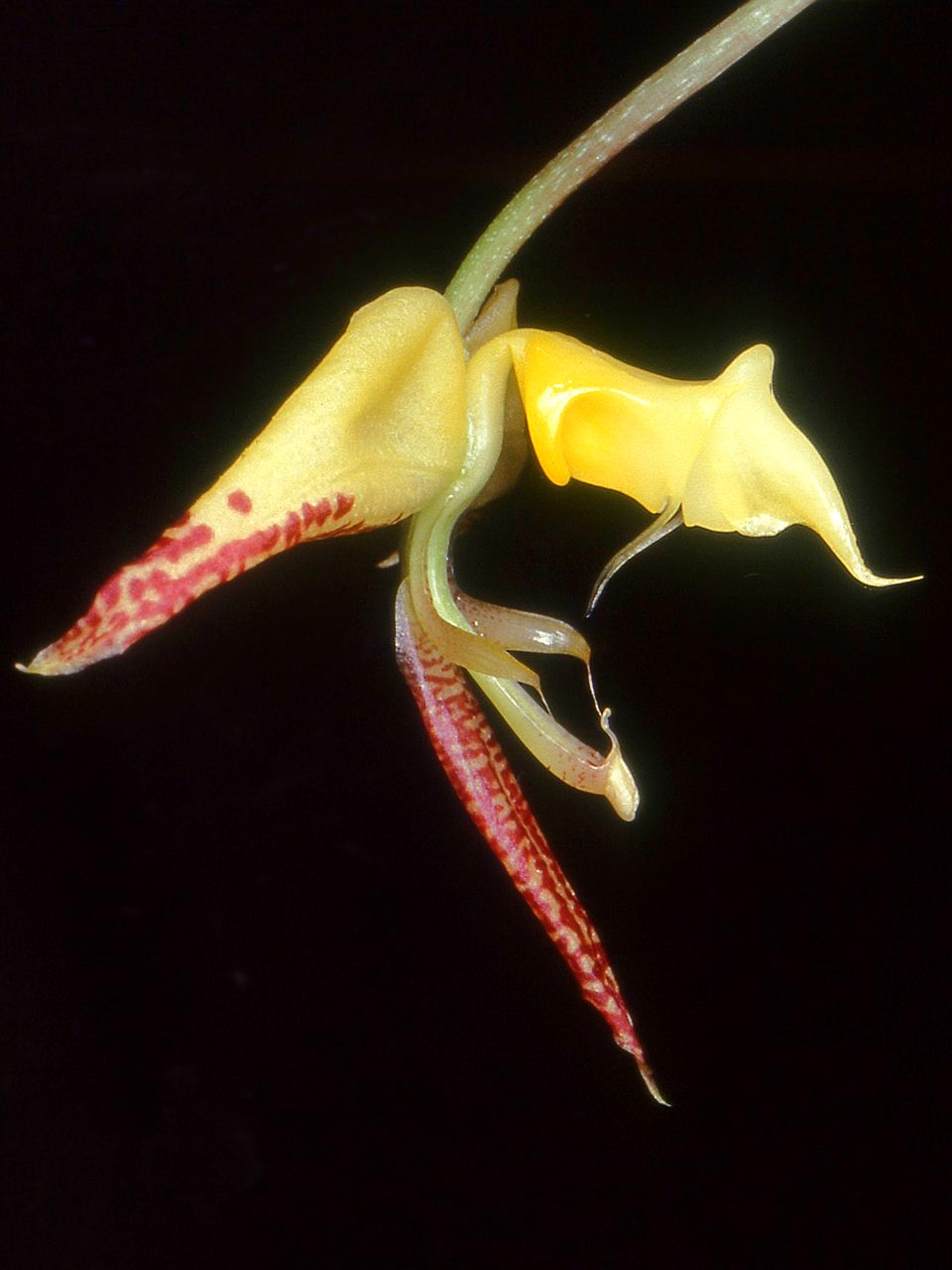 Gongora irmgardiae